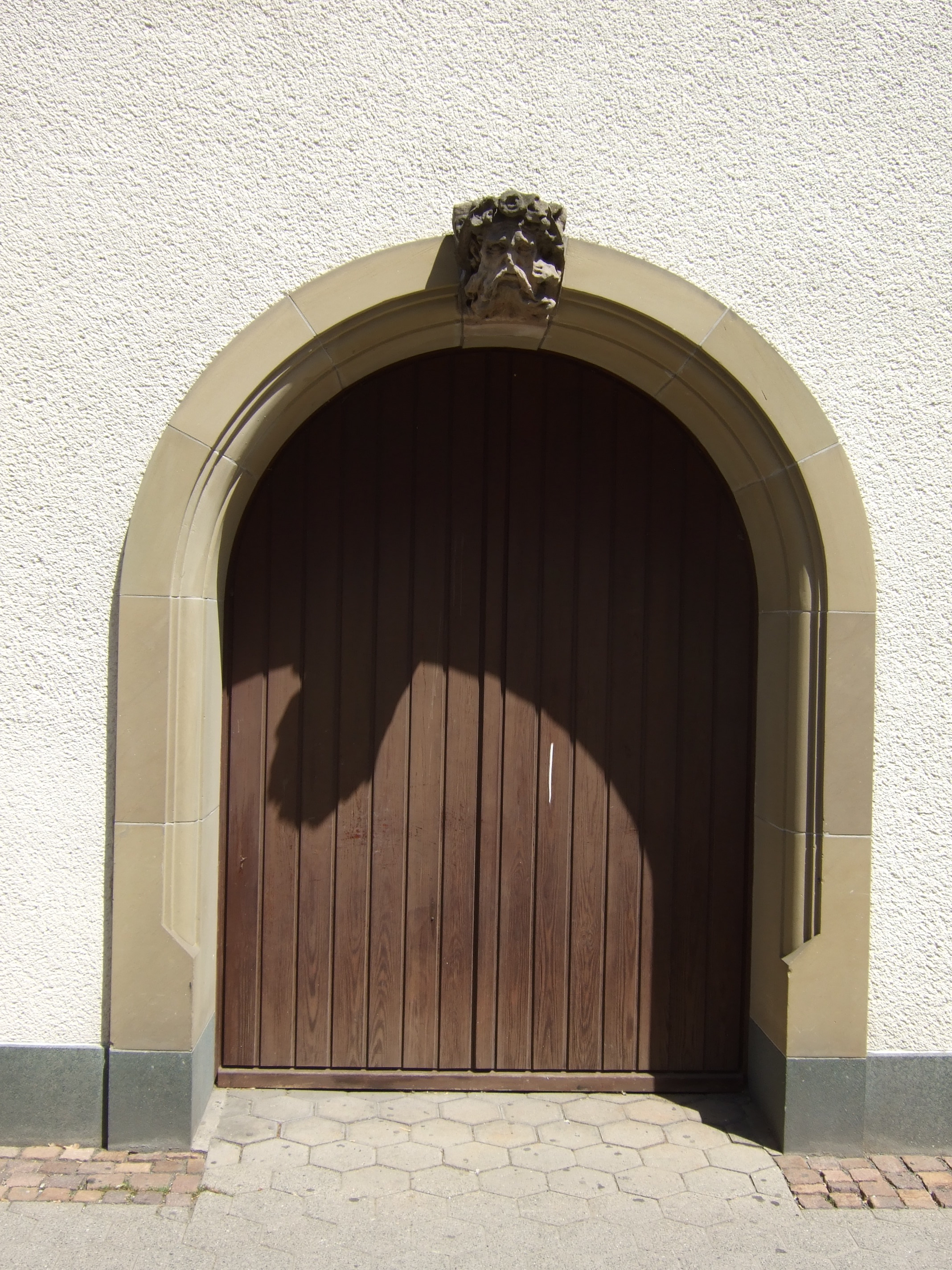 Schlussstein "Türkenhaus" Bayreuth. „Türkenhaus“ in der Richard-Wagner-Straße (erbaut 1709) wurde Mitte 1970 abgerissen.